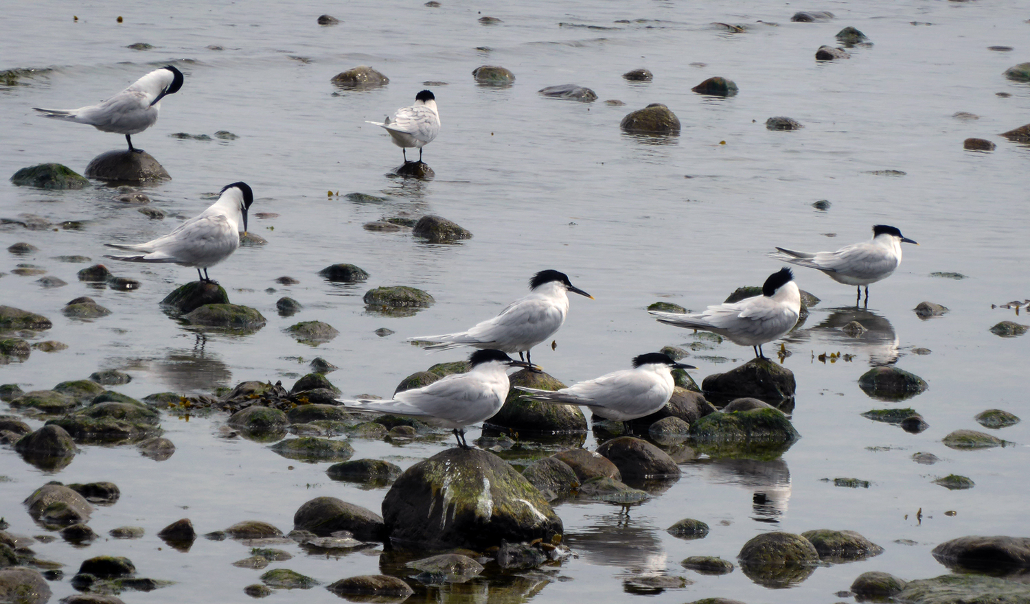 En flock rastar vid Världens ände i Ystad 17 maj 2017.